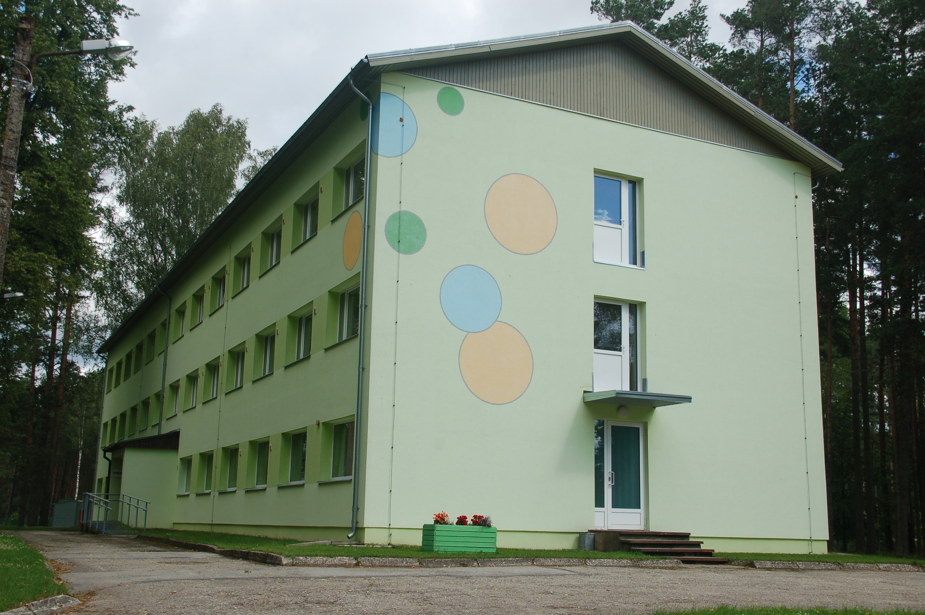 Kilingi Nõmme raamatukogu 2016